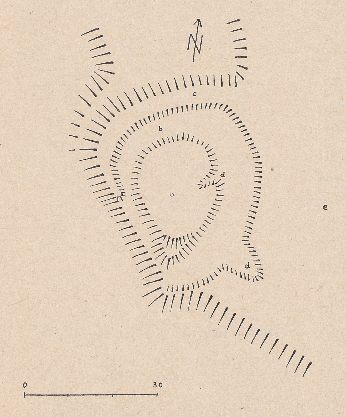 Burgstall Hohenkuchen - Skizze des Burgstalles von Hellmut Kunstmann. Aus: Mitteilungen der Altnürnberger Landschaft. Herausgegeben von der Altnürnberger Landschaft e.V, Dezember 1955, 4. Jahrgang, Heft 2, S. 22.